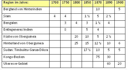 Kaufkraft von 100 Kauris in Goldpfennig (Quelle: Schilder 1952, S. 46).